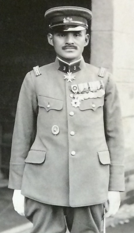 近歩三連隊長時代